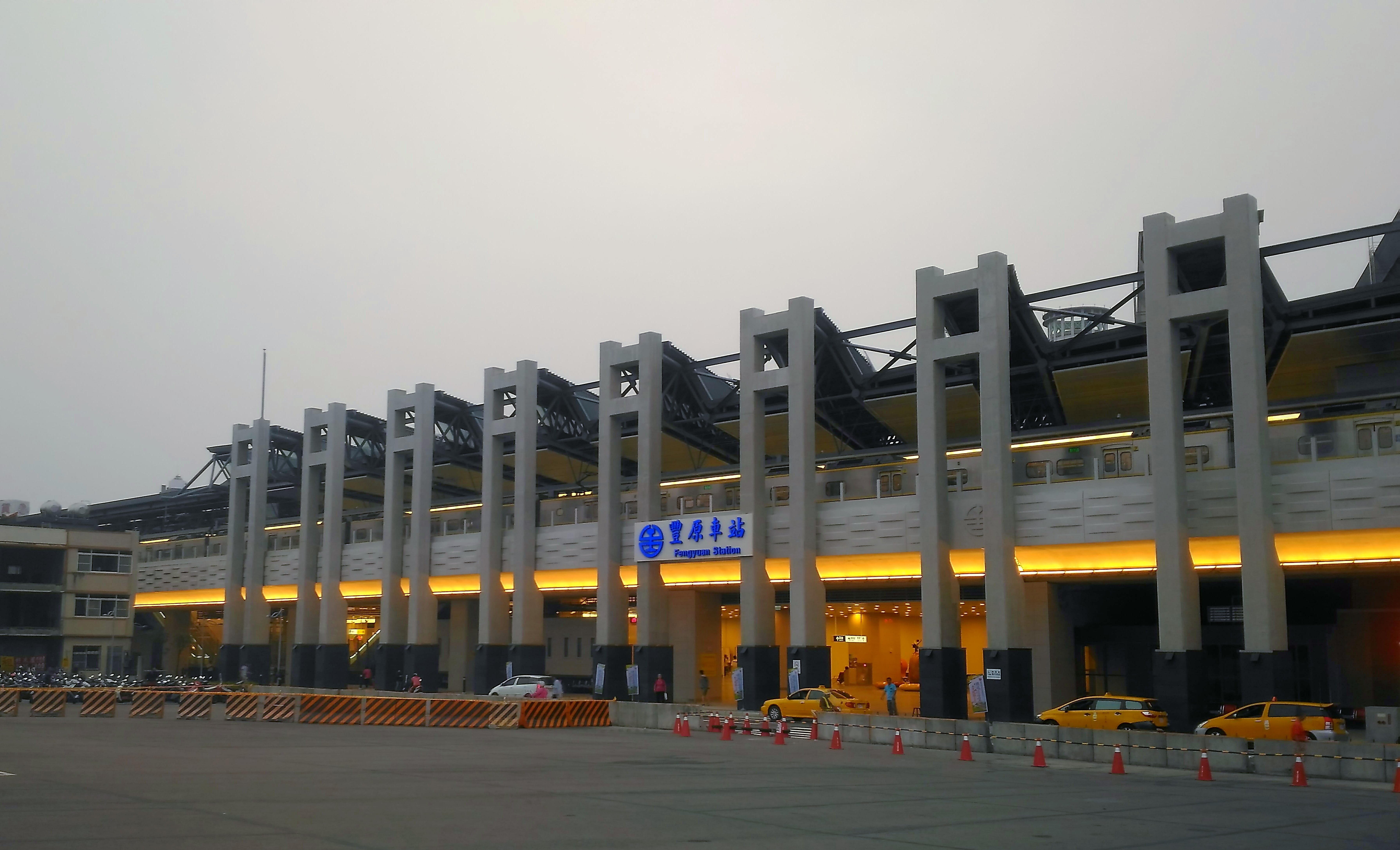 豐原車站(新高架車站)